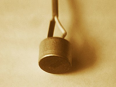 Esempio di capsula microfonica a condensatore.